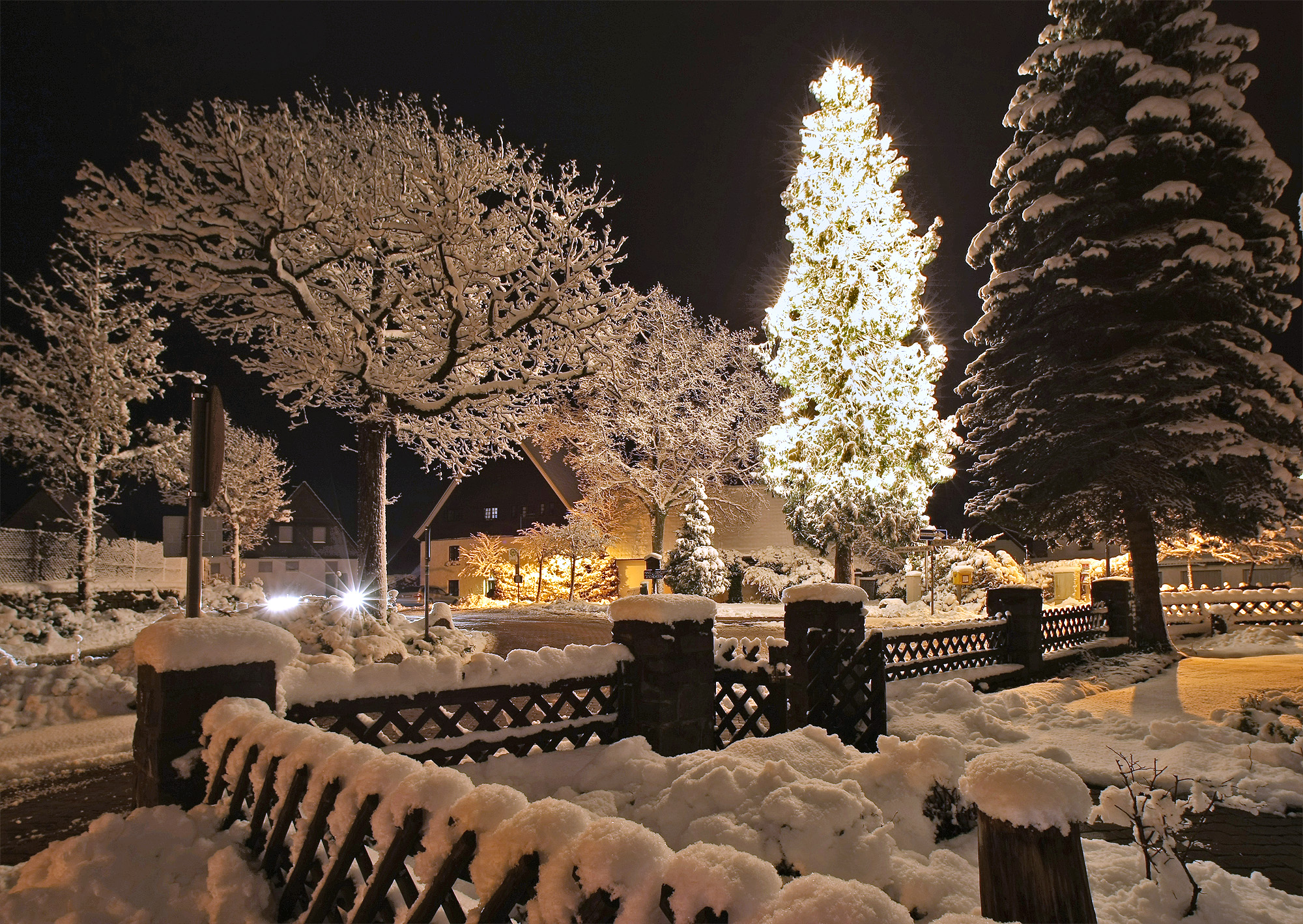 Der Weihnachtsbaum in Marienheide-Müllenbach.